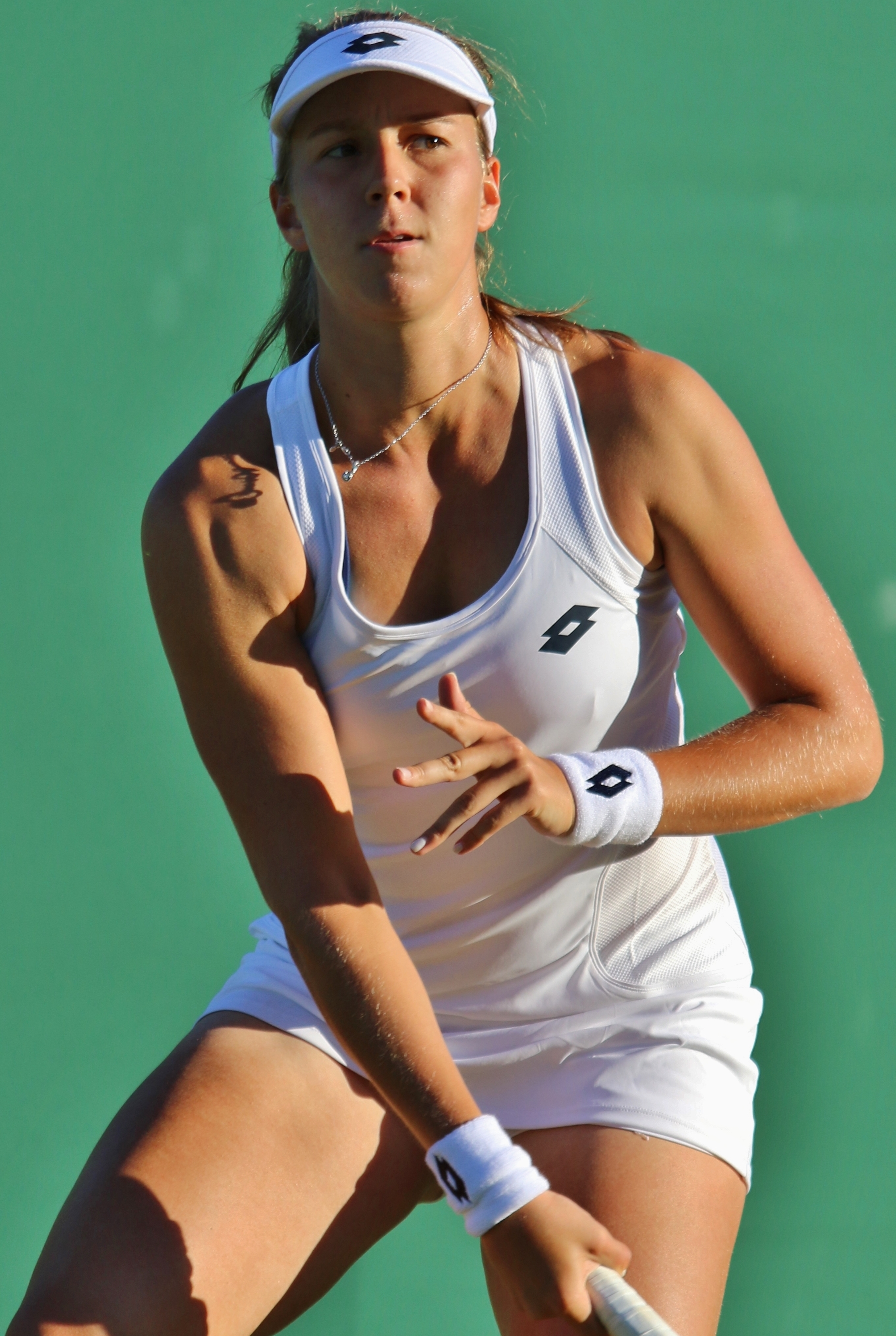 Lapko WM18 (48)